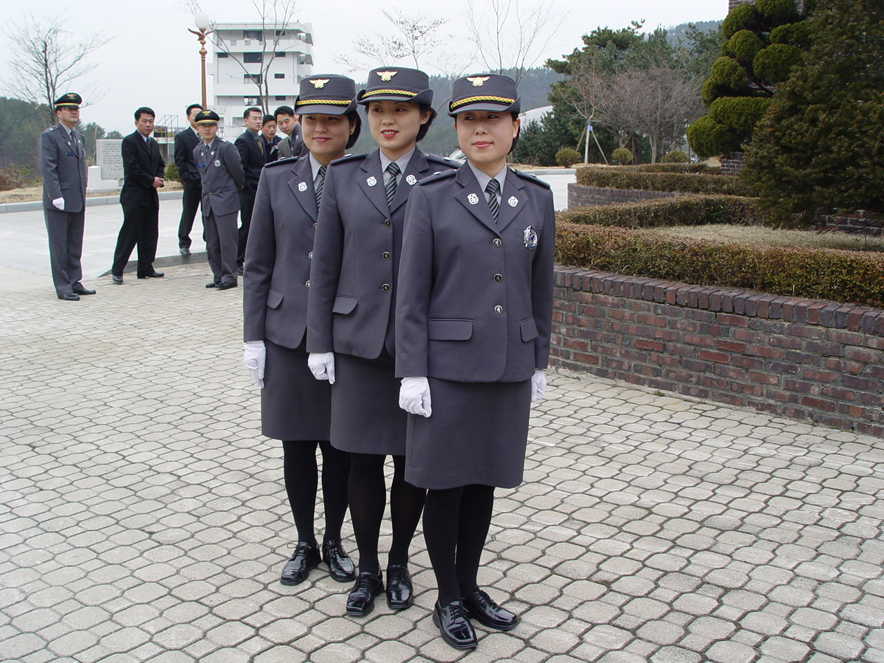 진광미, 한선, 김현정, 제12기 소방간부후보생